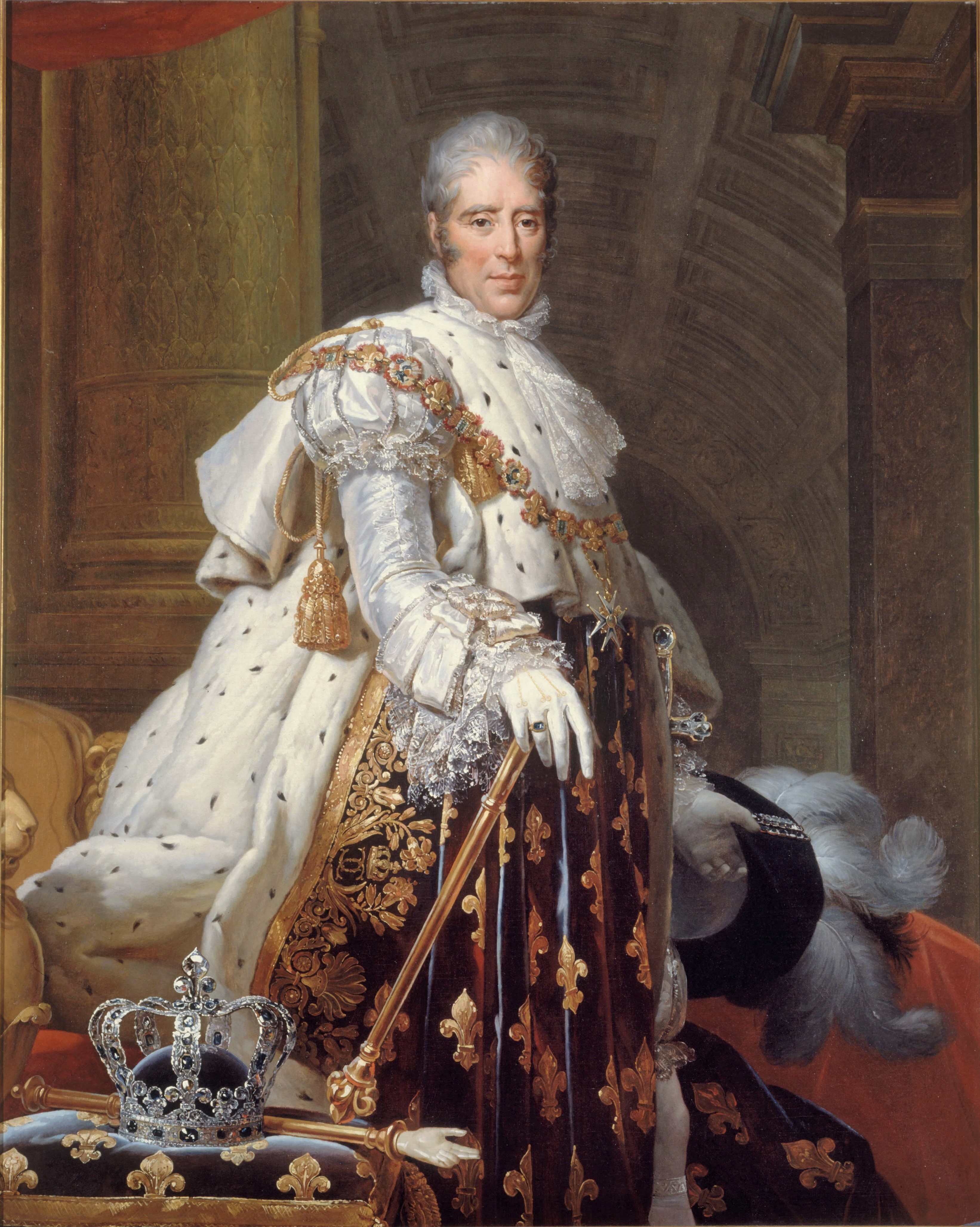 Portrait de Charles X en tenue de sacre.